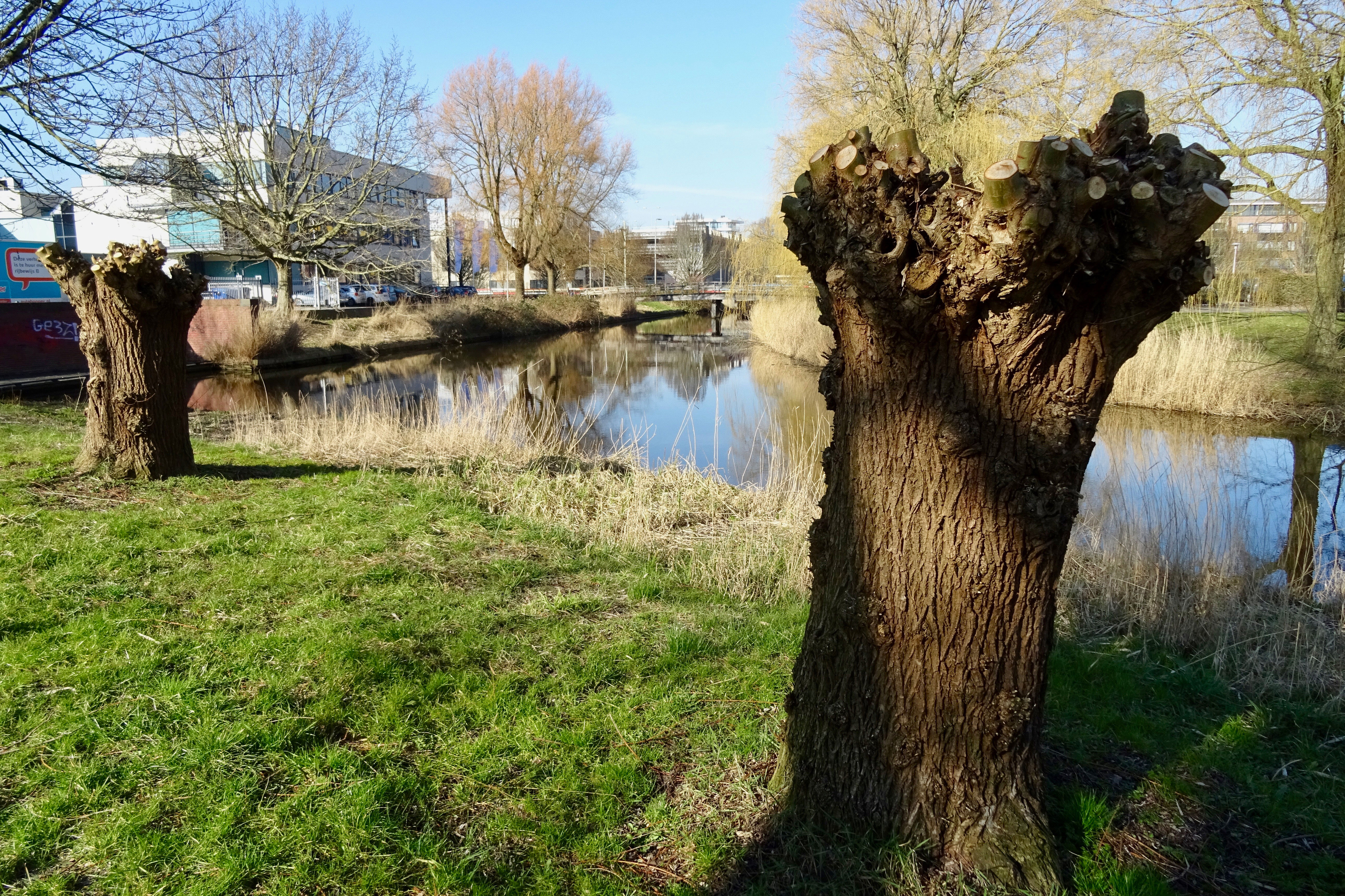 Zicht op de Potmarge in Leeuwarden